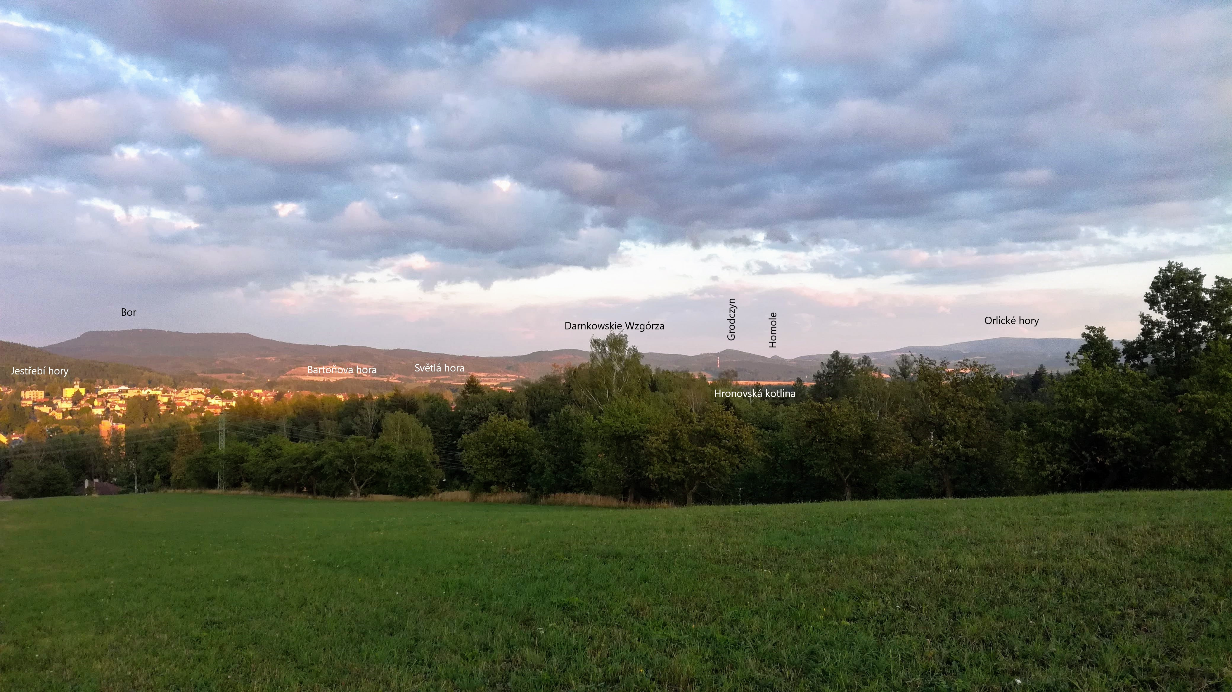 Levínská vrchovina mezi Borem a Orlickými horami